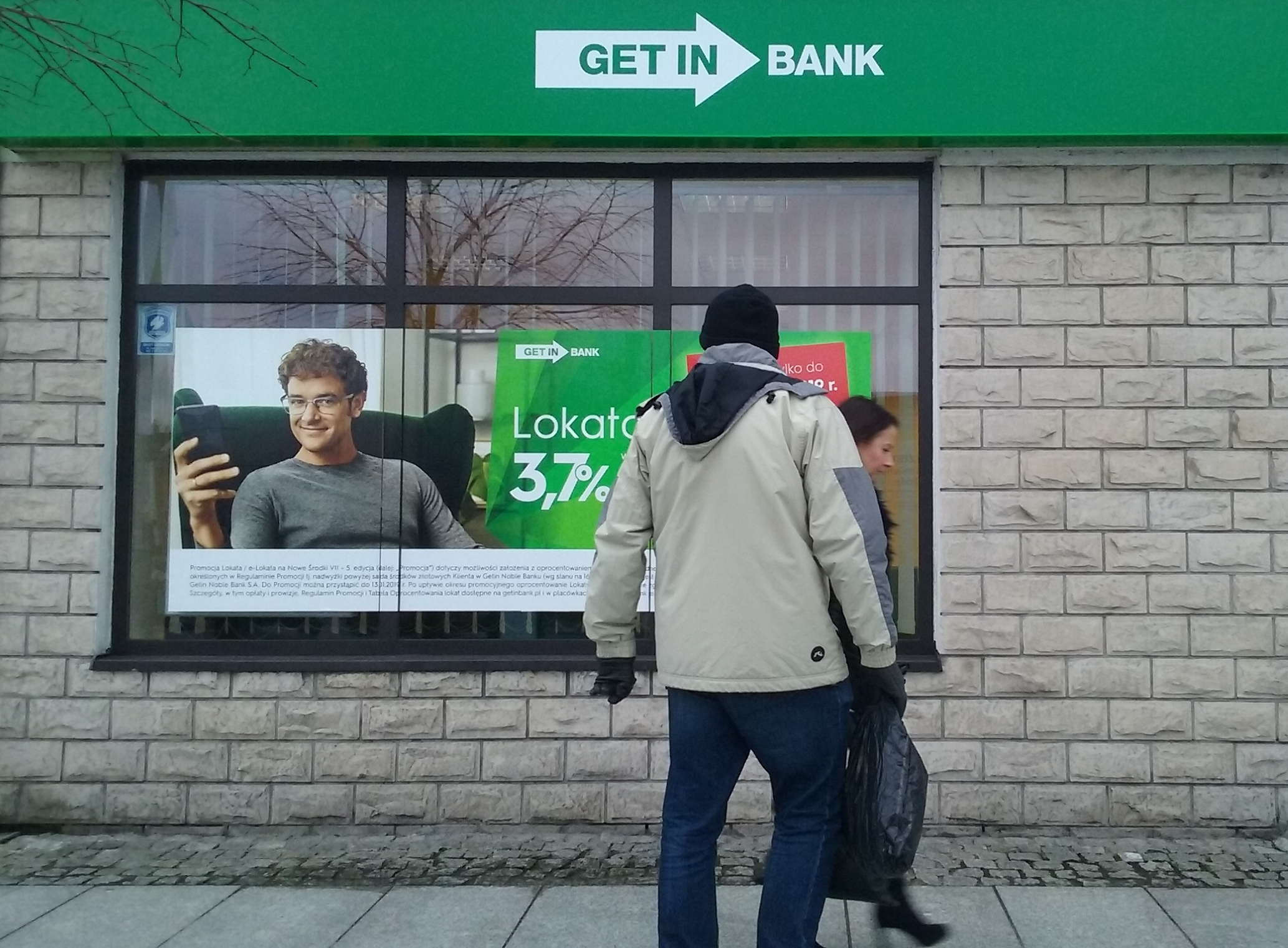 GET IN Bank w 60-tysięcznym Tomaszowie Mazowieckim w województwie łódzkim